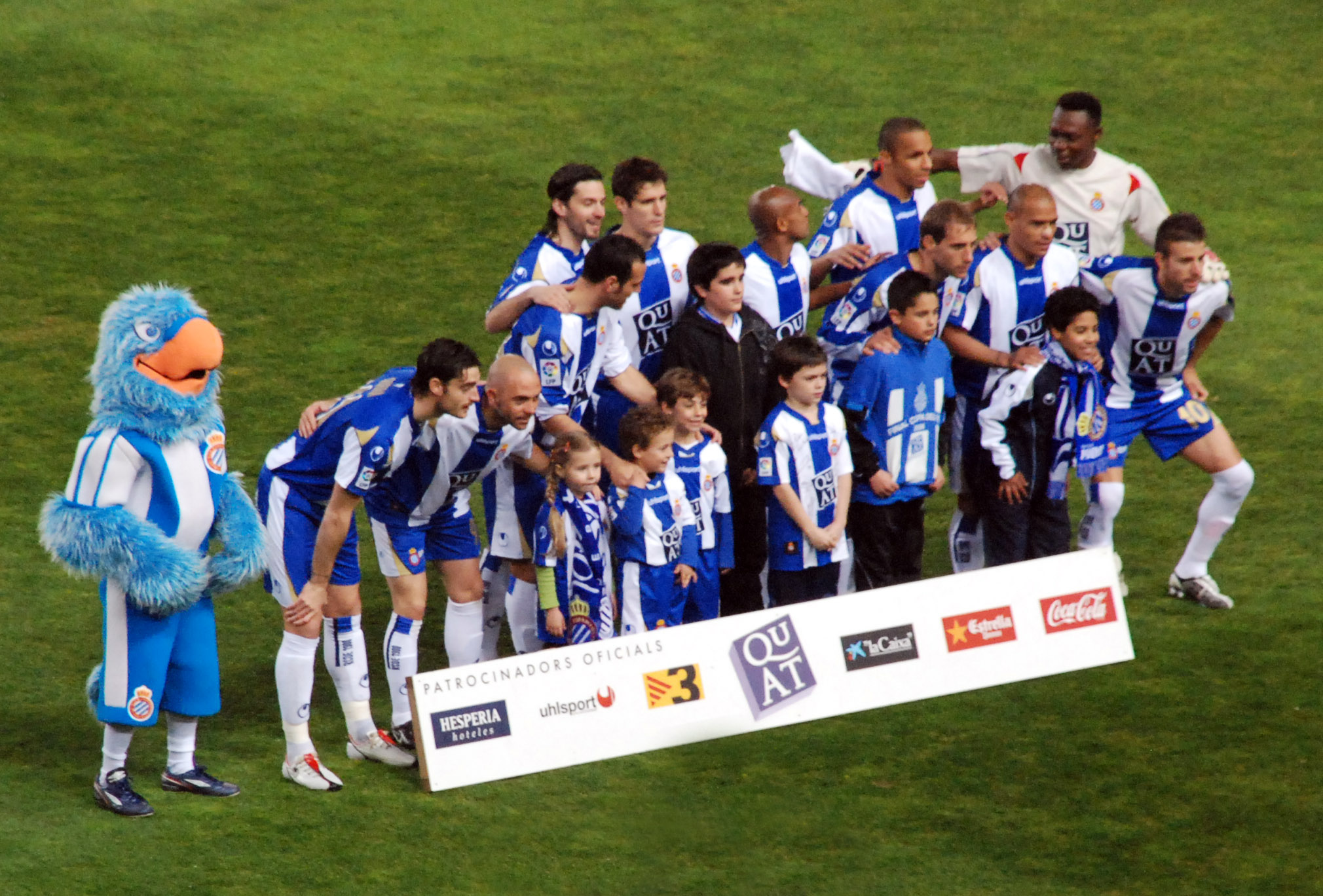 Plantilla Espanyol 2007-2008